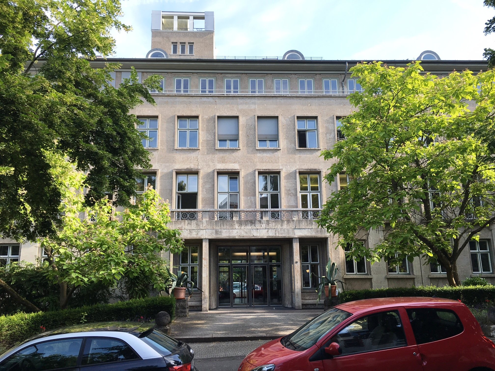 Das Bild zeigt das Eingangsportal des Gebäudes des Regierungspräsidiums Darmstadt in der Lessingstraße in Wiesbaden.